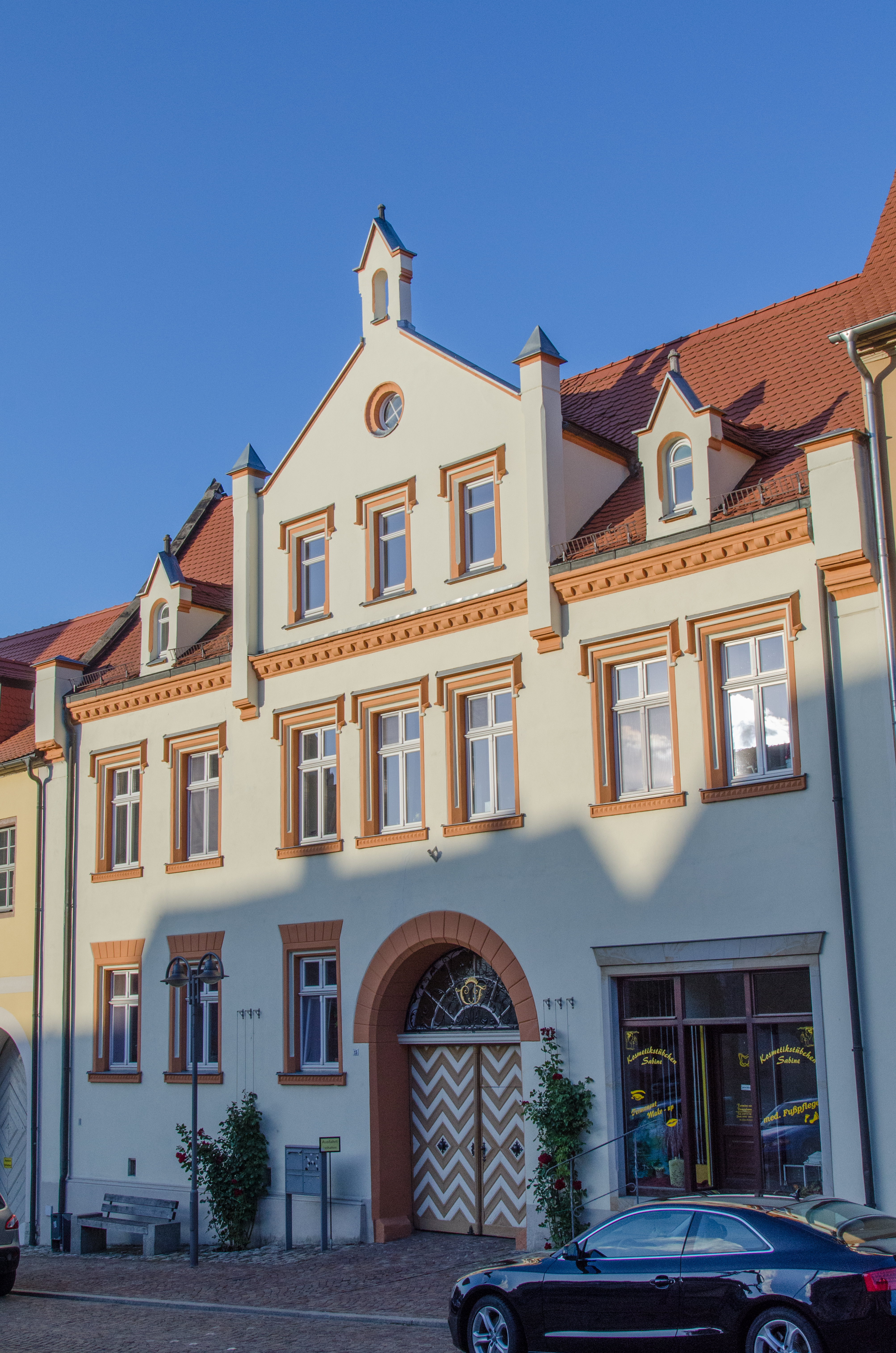 Querfurt, Markt 15